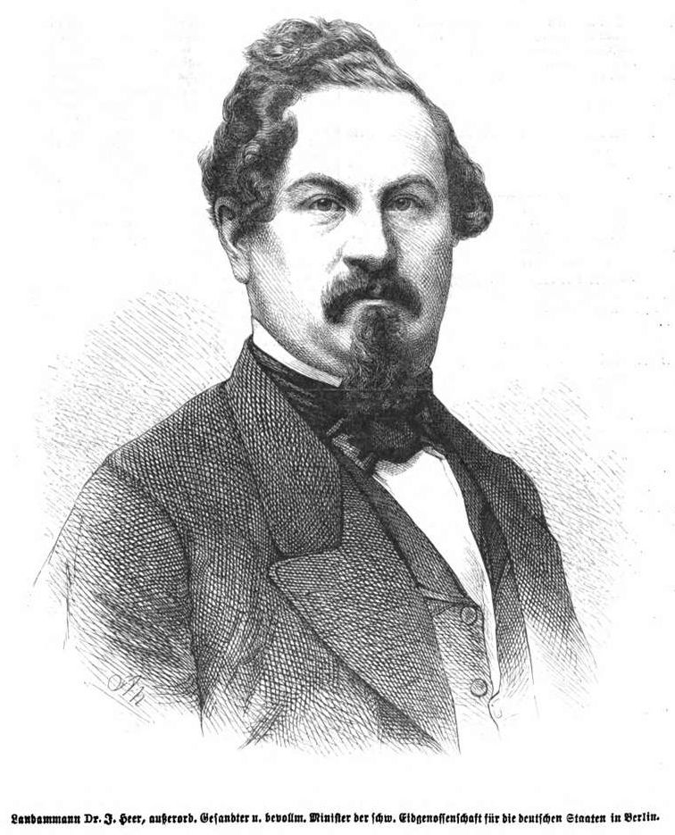 Joachim Heer, schweizer Diplomat, Bevollmächtigter in Deutschland im 19. Jh.